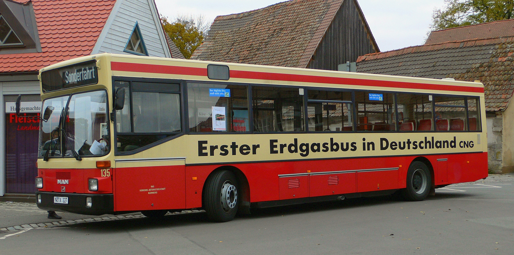 MAN SL 202 (CNG) (Wagen 135) der VAG Verkehrs-Aktiengesellschaft Nürnberg